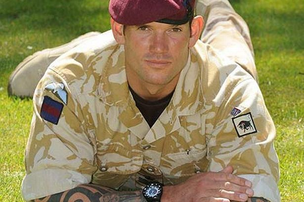 craig harrison